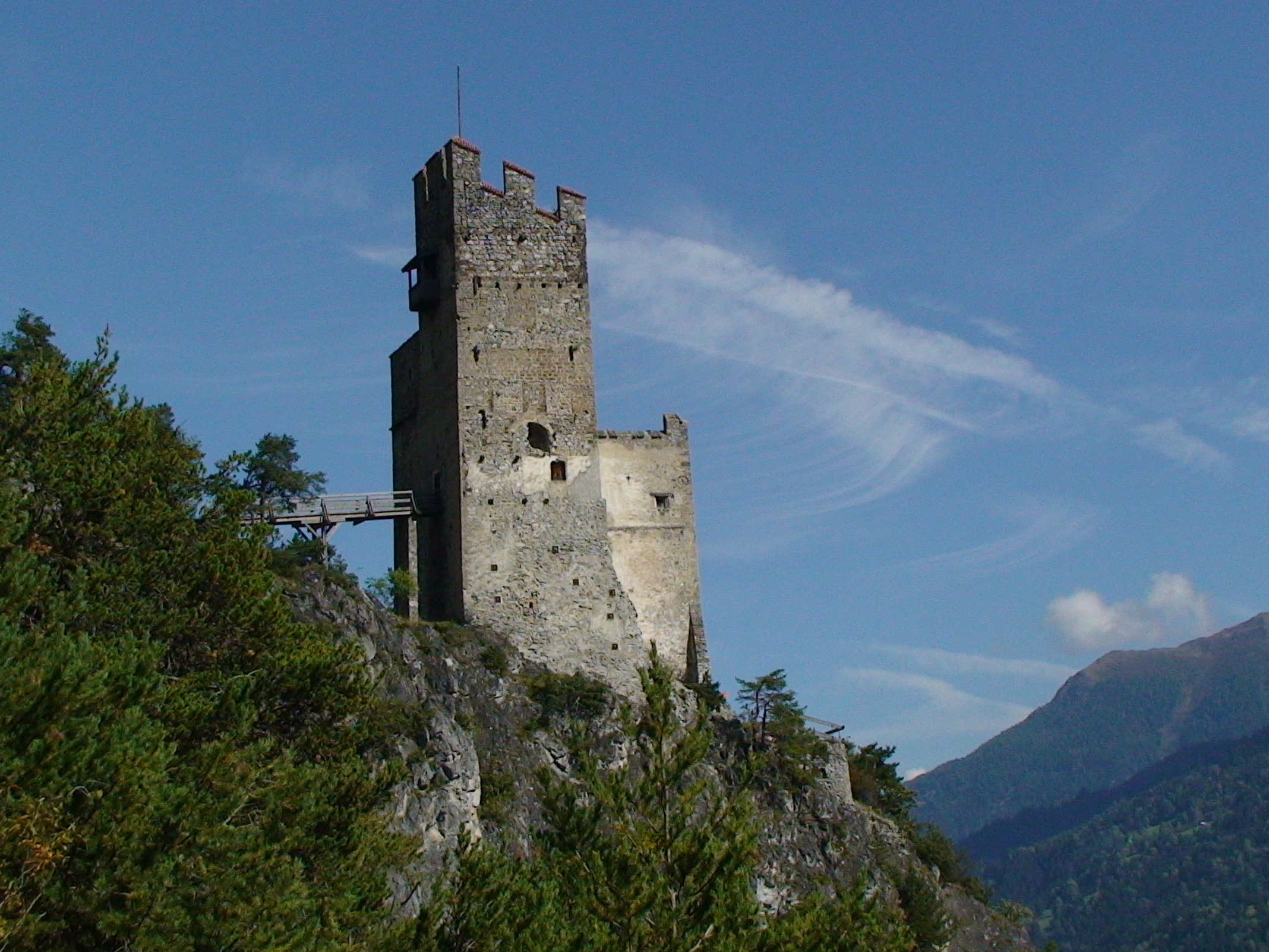 Burgruine Schrofenstein